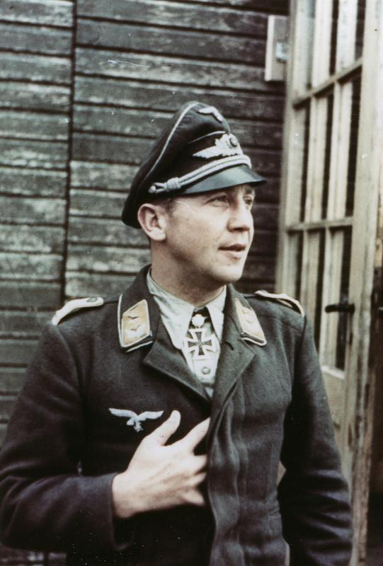 Dörffel,Georg